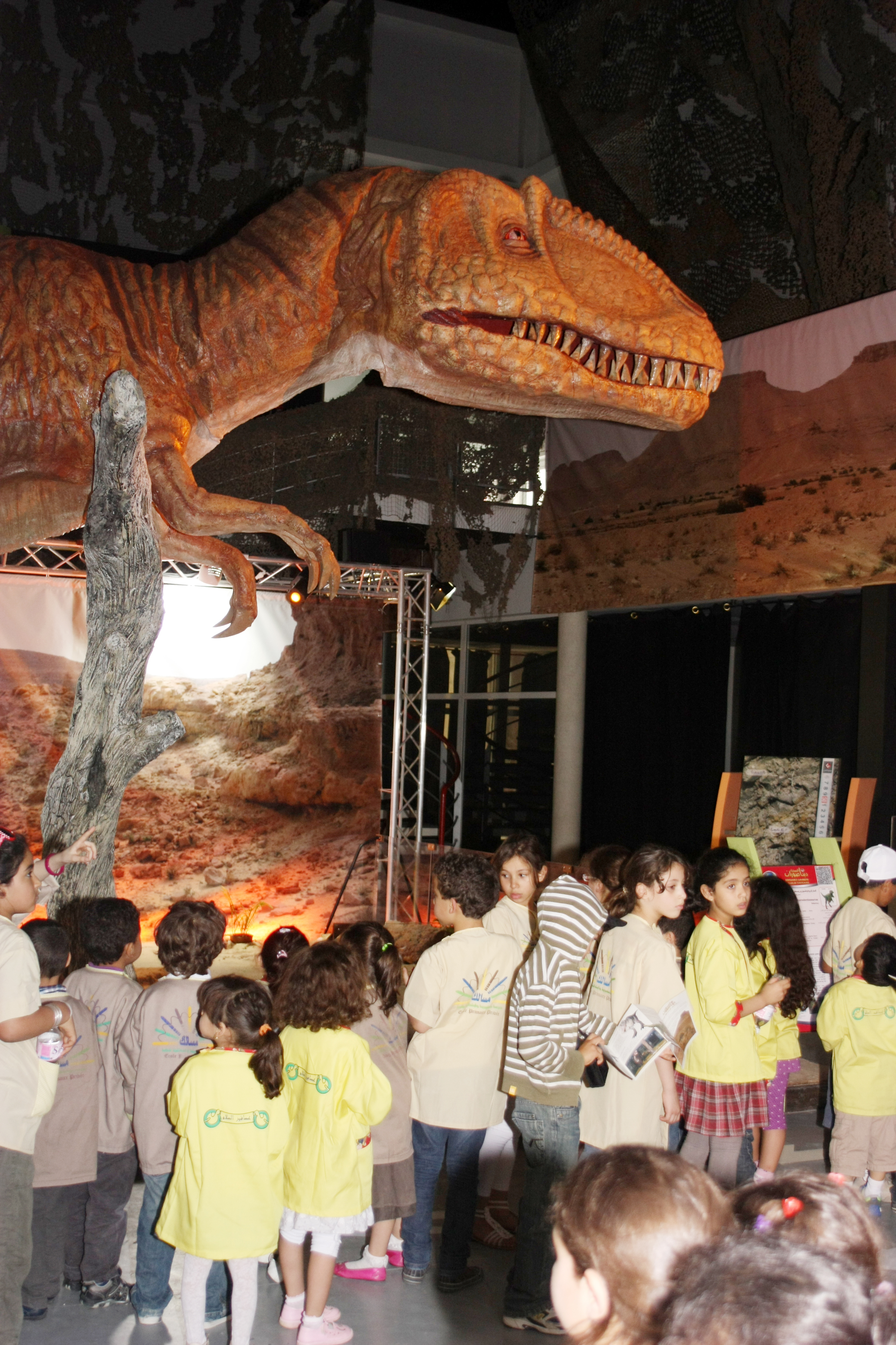 Exposition scientifique "Les dinosaures sahariens" à la Cité des sciences de Tunis